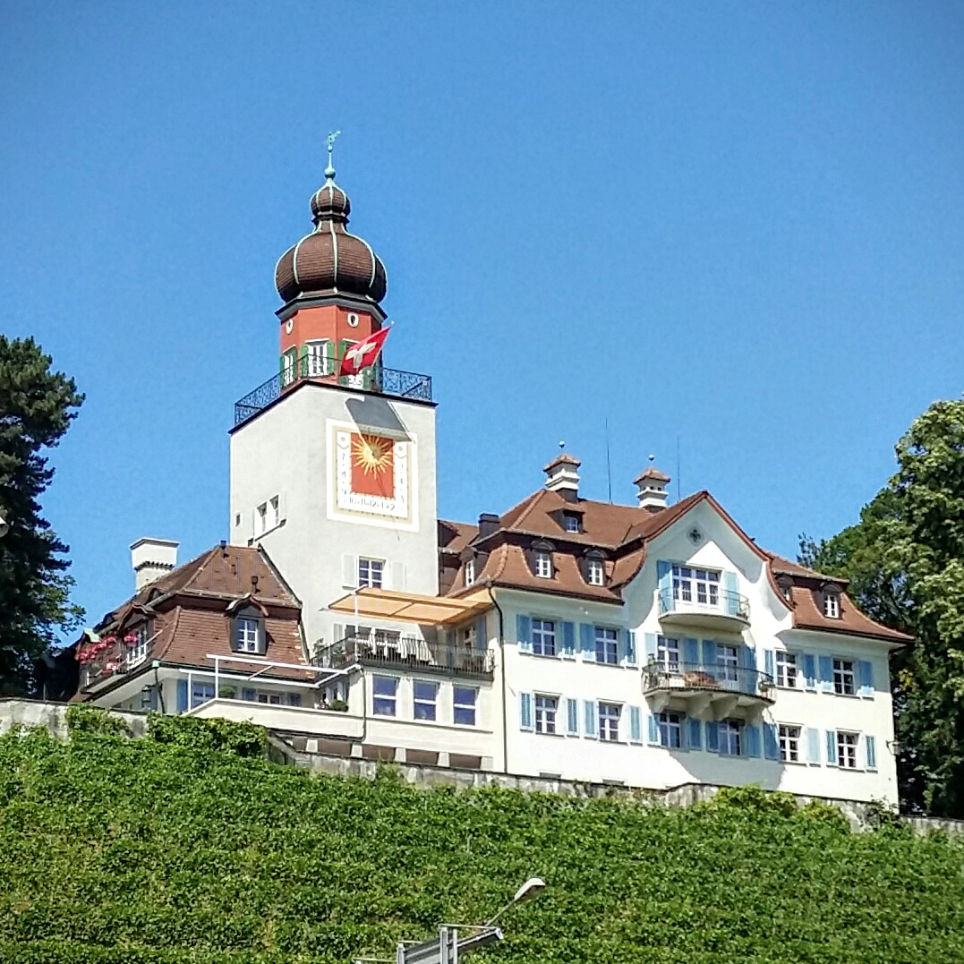 Schloss Heerbrugg mit Rebberg im Sommer